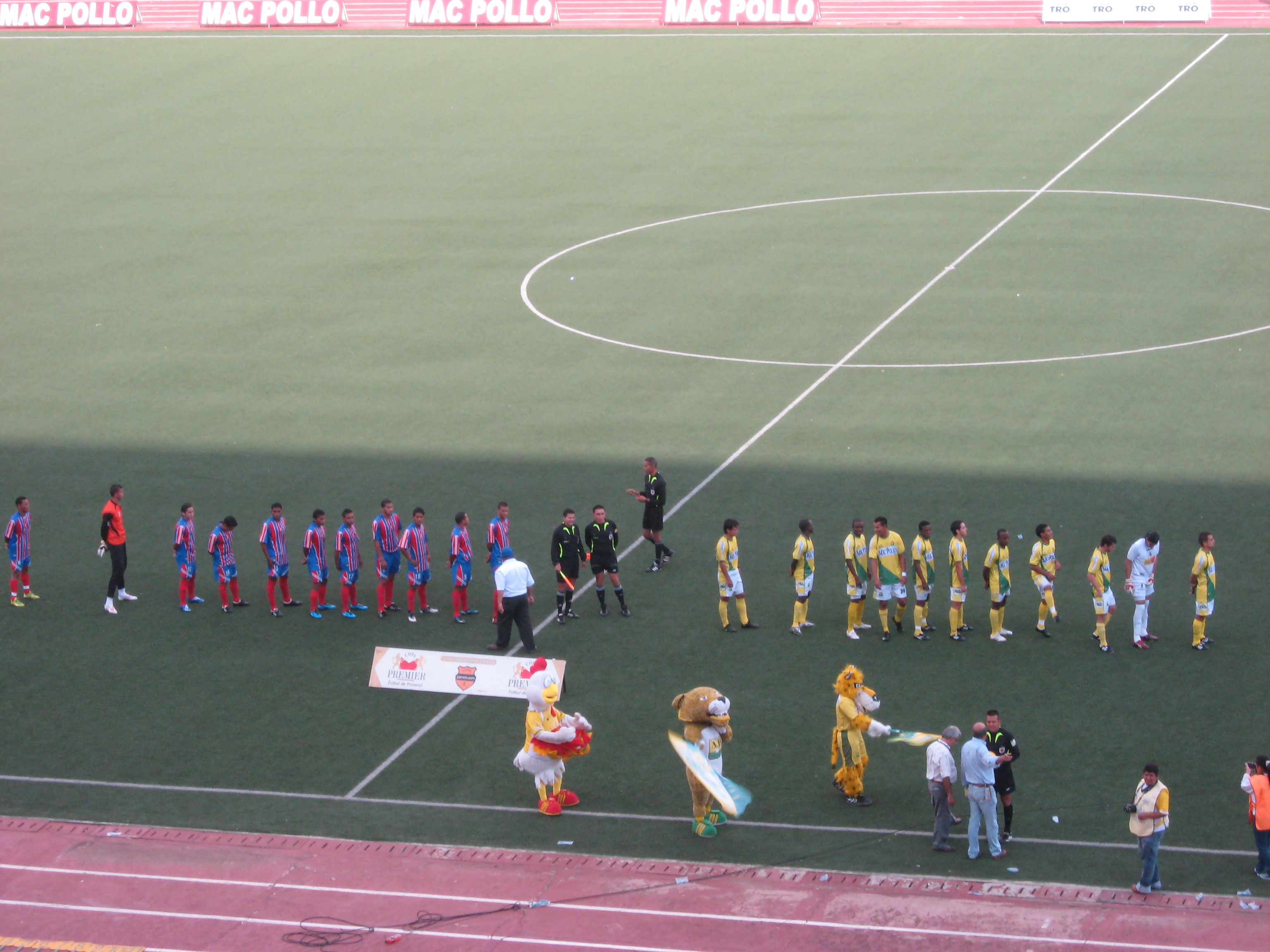 Partido Atletico Bucaramanga Vs. Union Magdalena. Finales Copa Premier 2009.